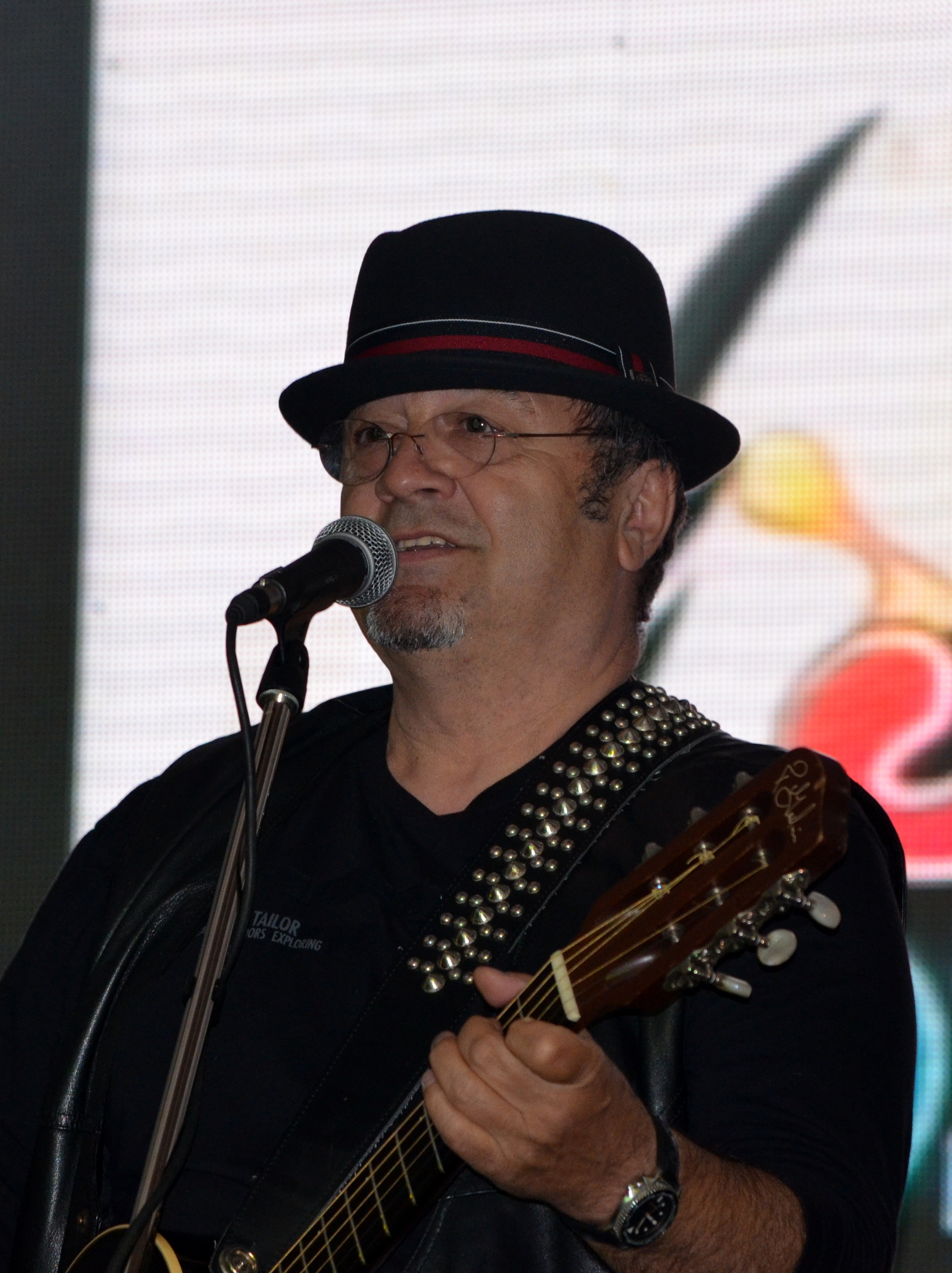 Mircea Baniciu Pasărea Colibri concert, at Bier Zone Fest 2012